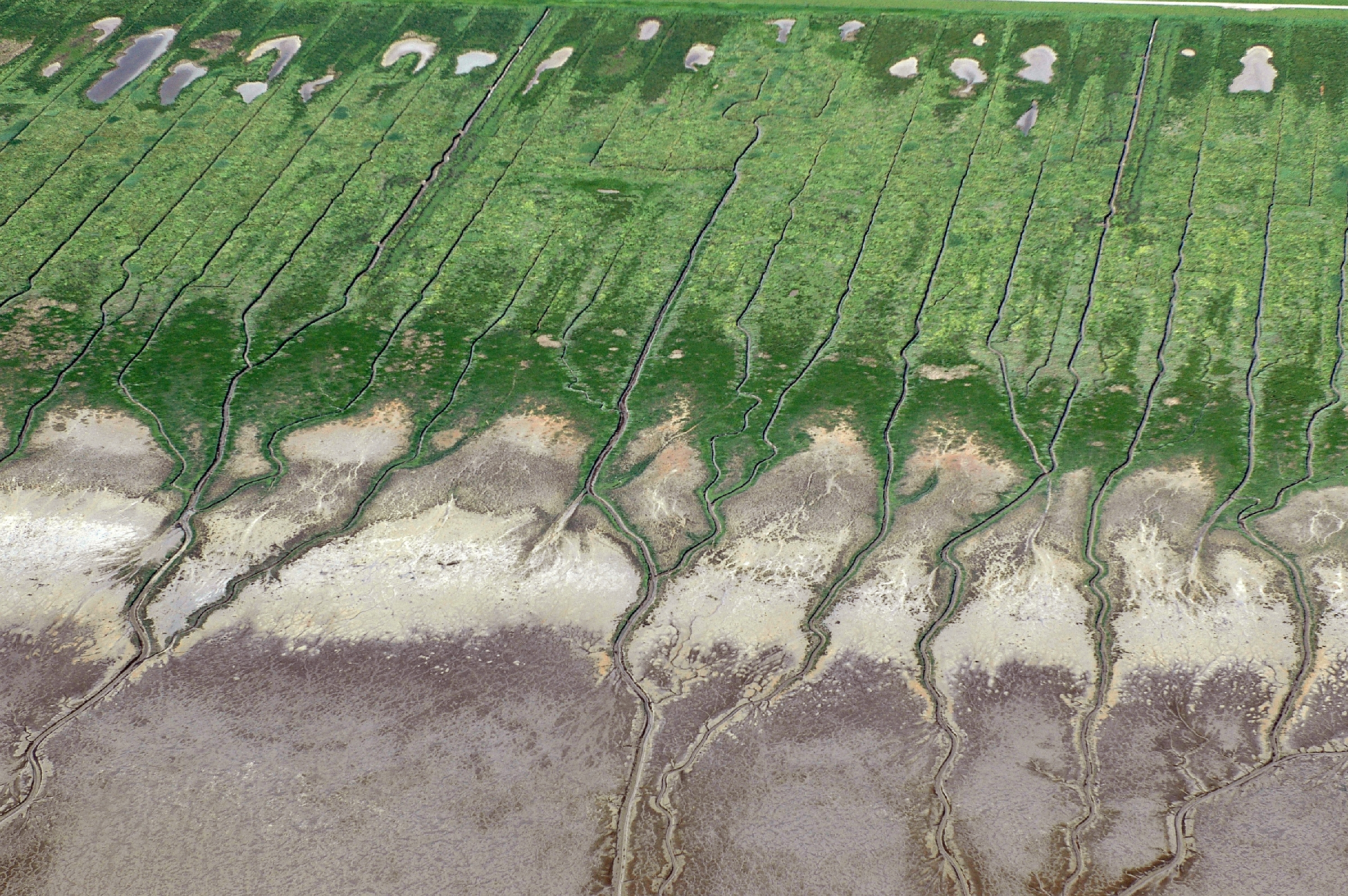 Fotoflug vom Flugplatz Nordholz-Spieka über Cuxhaven und Wilhelmshaven